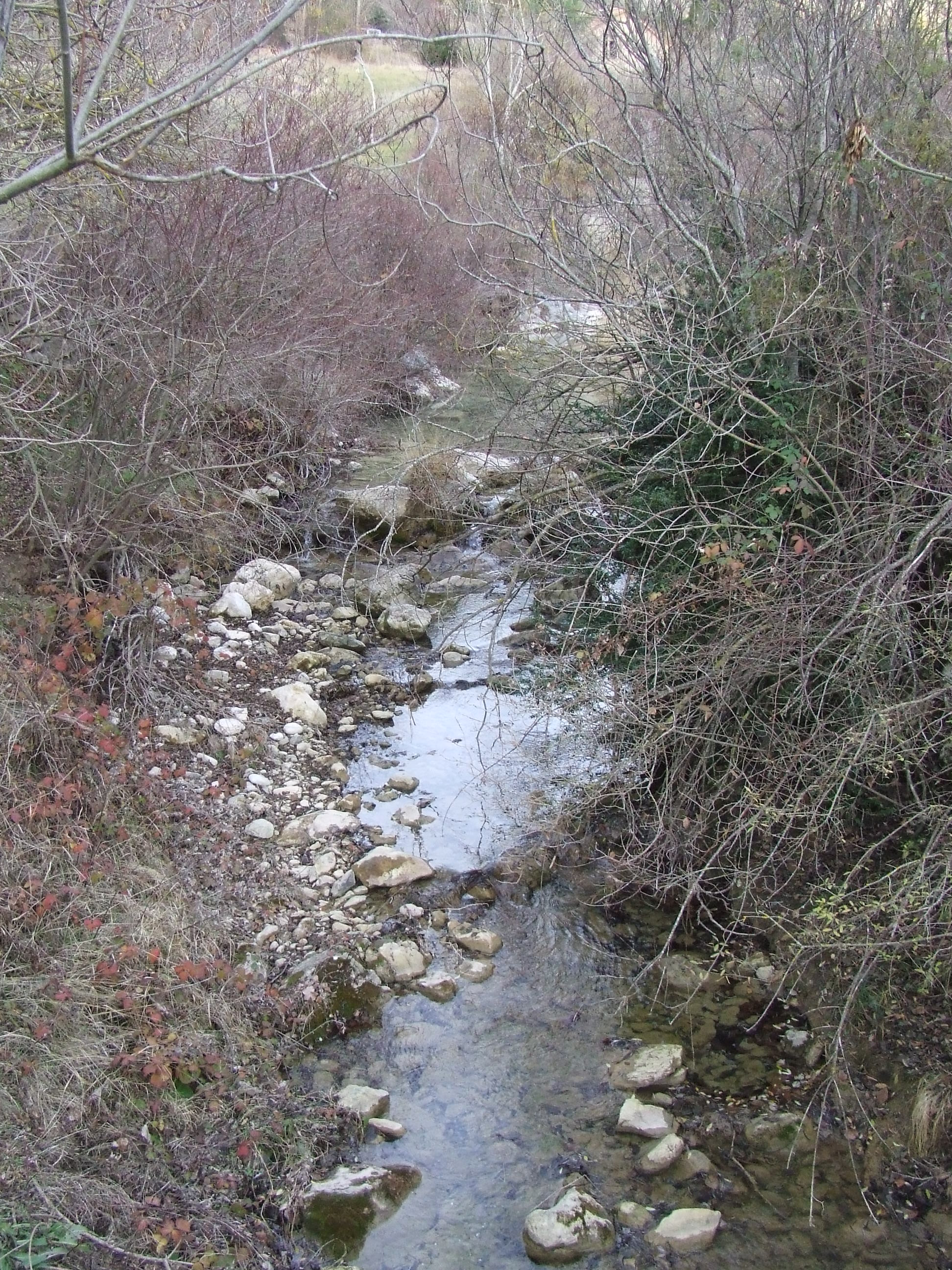 El riu Pujals, al Molí de Bóixols (Abella de la Conca, Pallars Jussà)